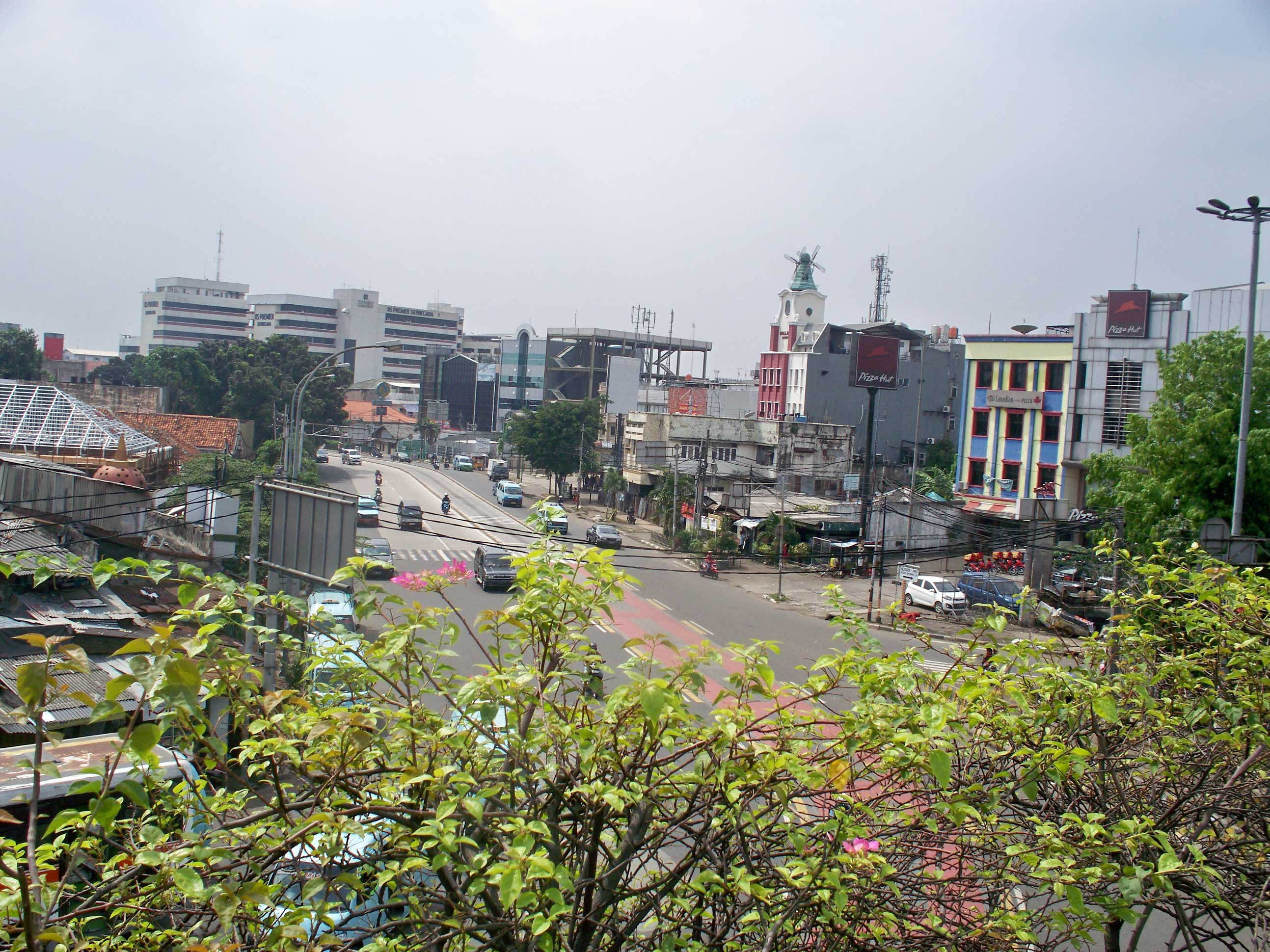 Diatas Fly Over Kampung Melayu